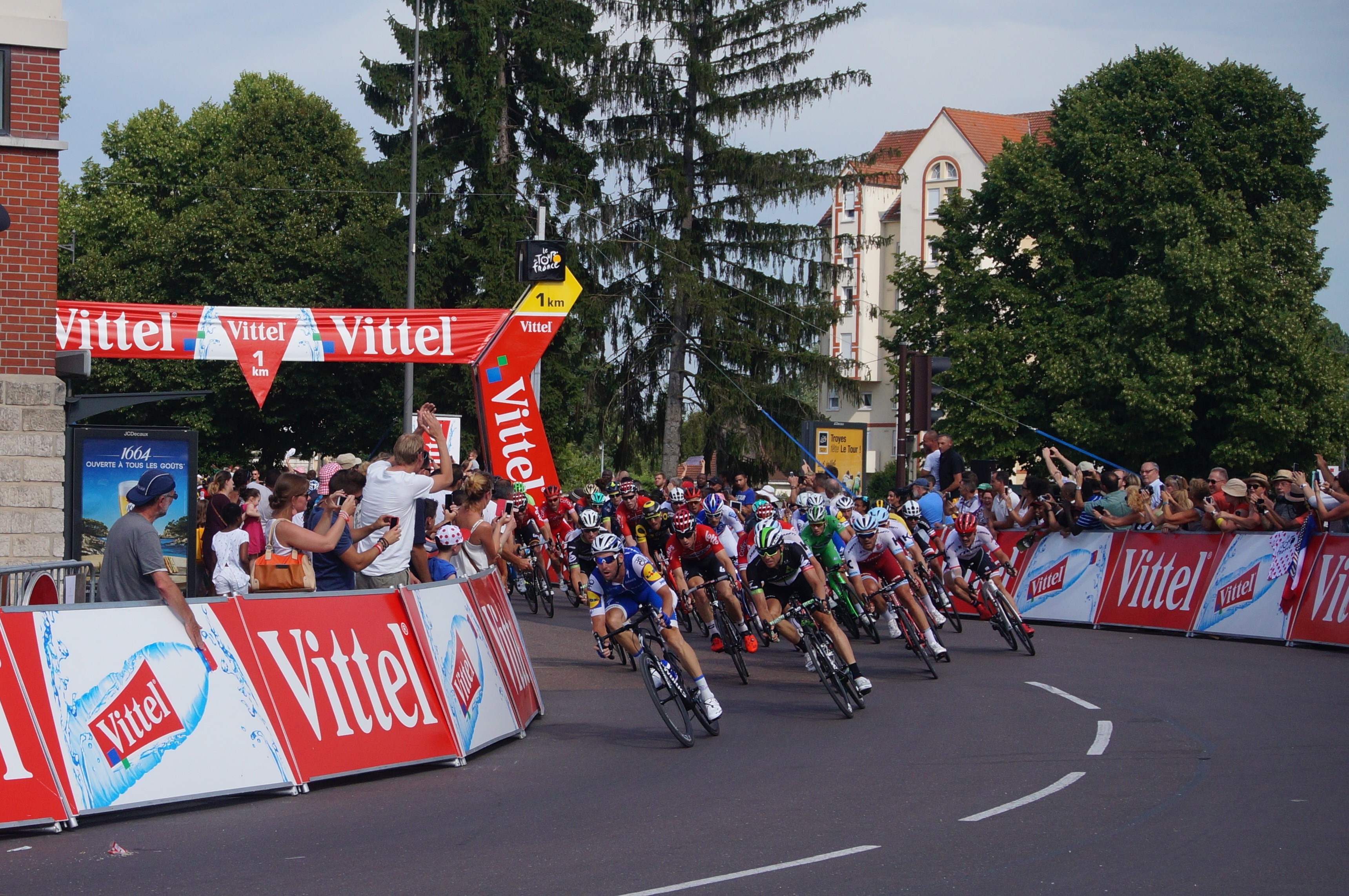 Sprint à 1 km de l'arrivée sur la 6e étape du Tour de France entre Vesoul et Troyes. (à compléter avec les noms des coureurs cyclistes)